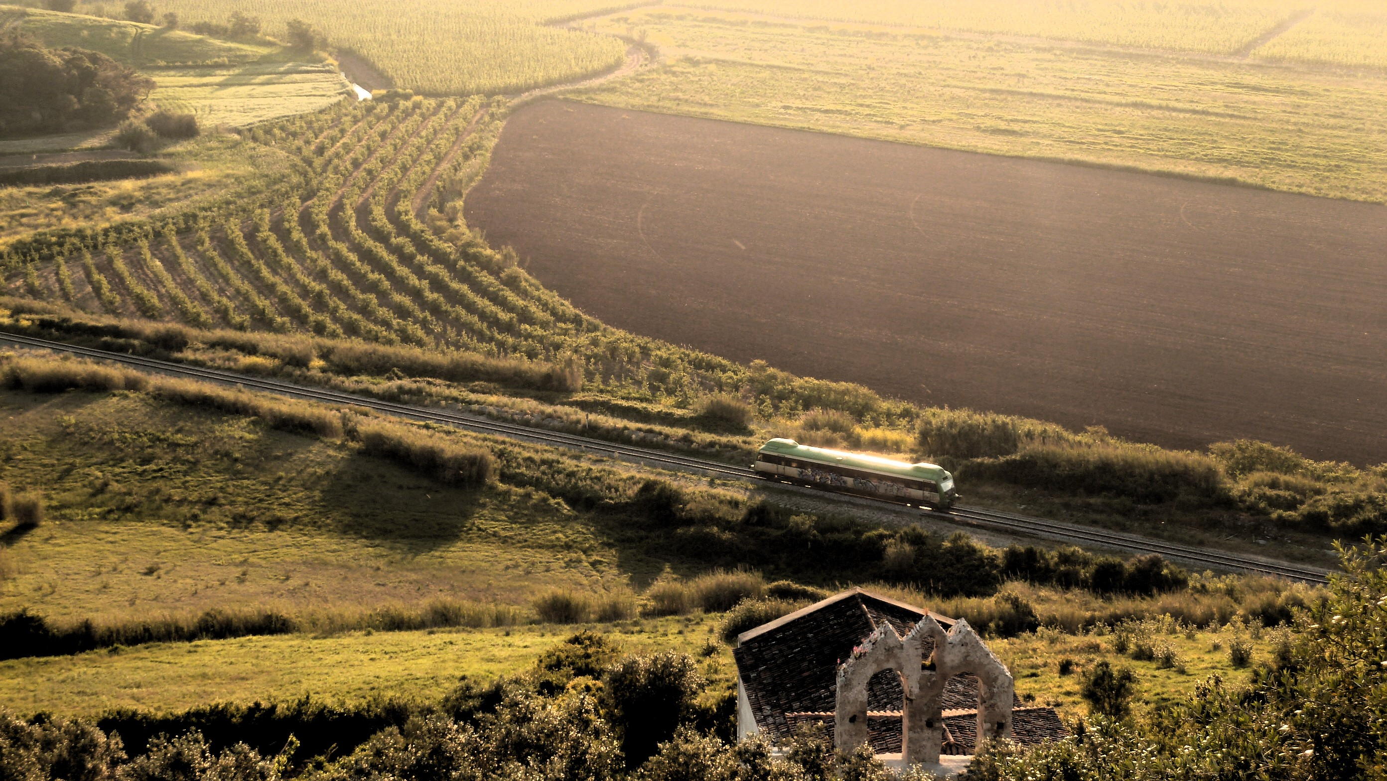 Óbidos